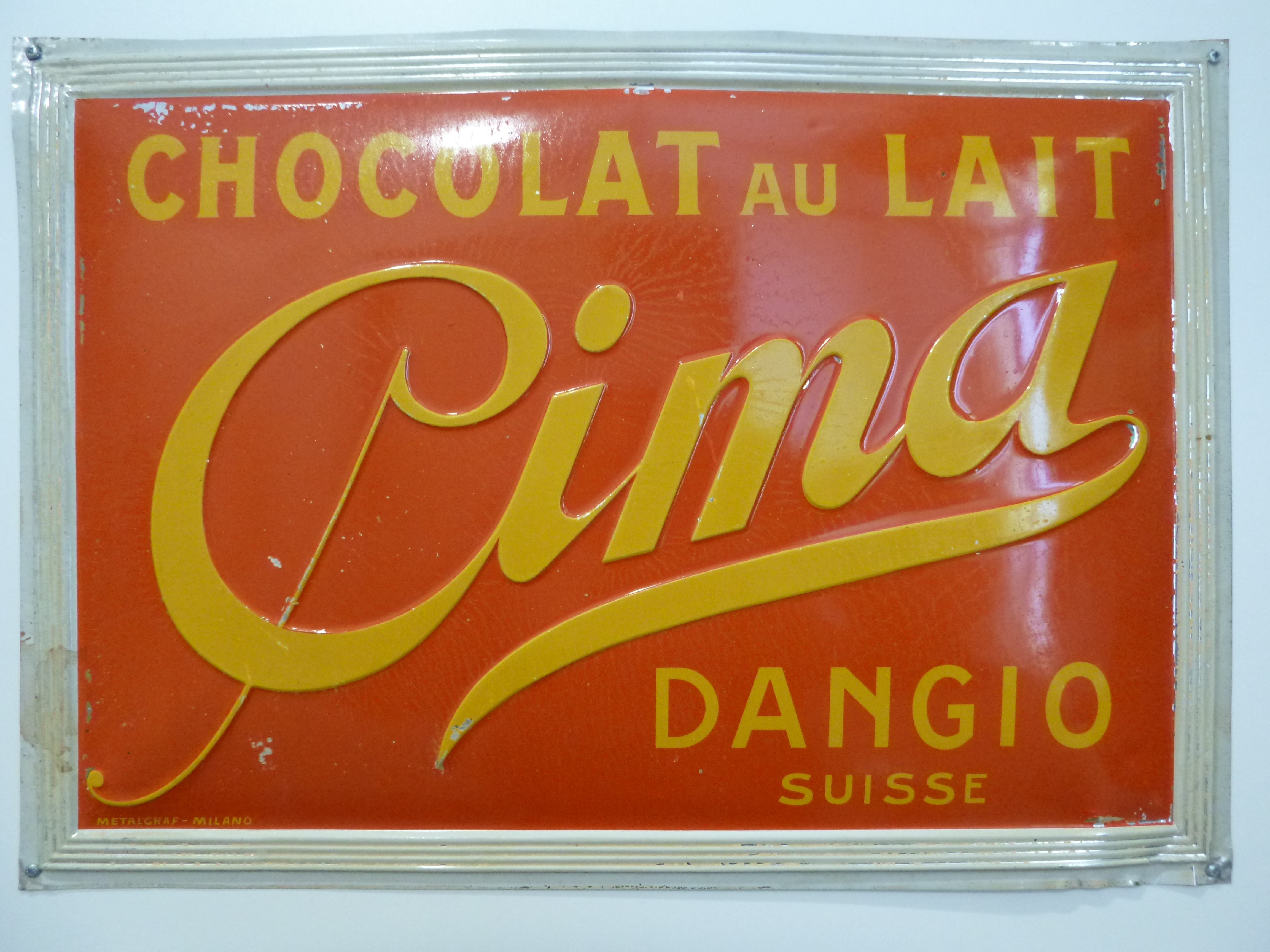 Werbeschild für die Produkte der Cima Norma